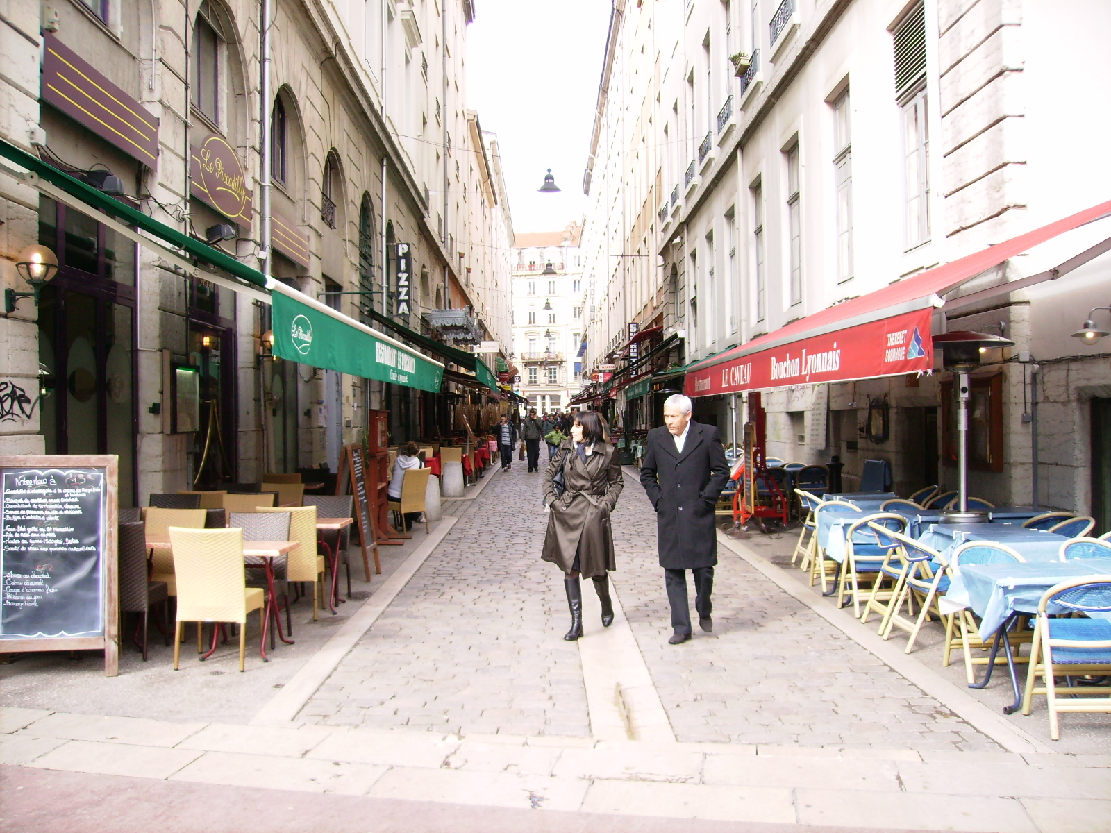 Rue des Marronniers Lyon 2e